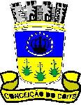 Este é o Brasão do município de Conceição do Coité Bahia Brasil.